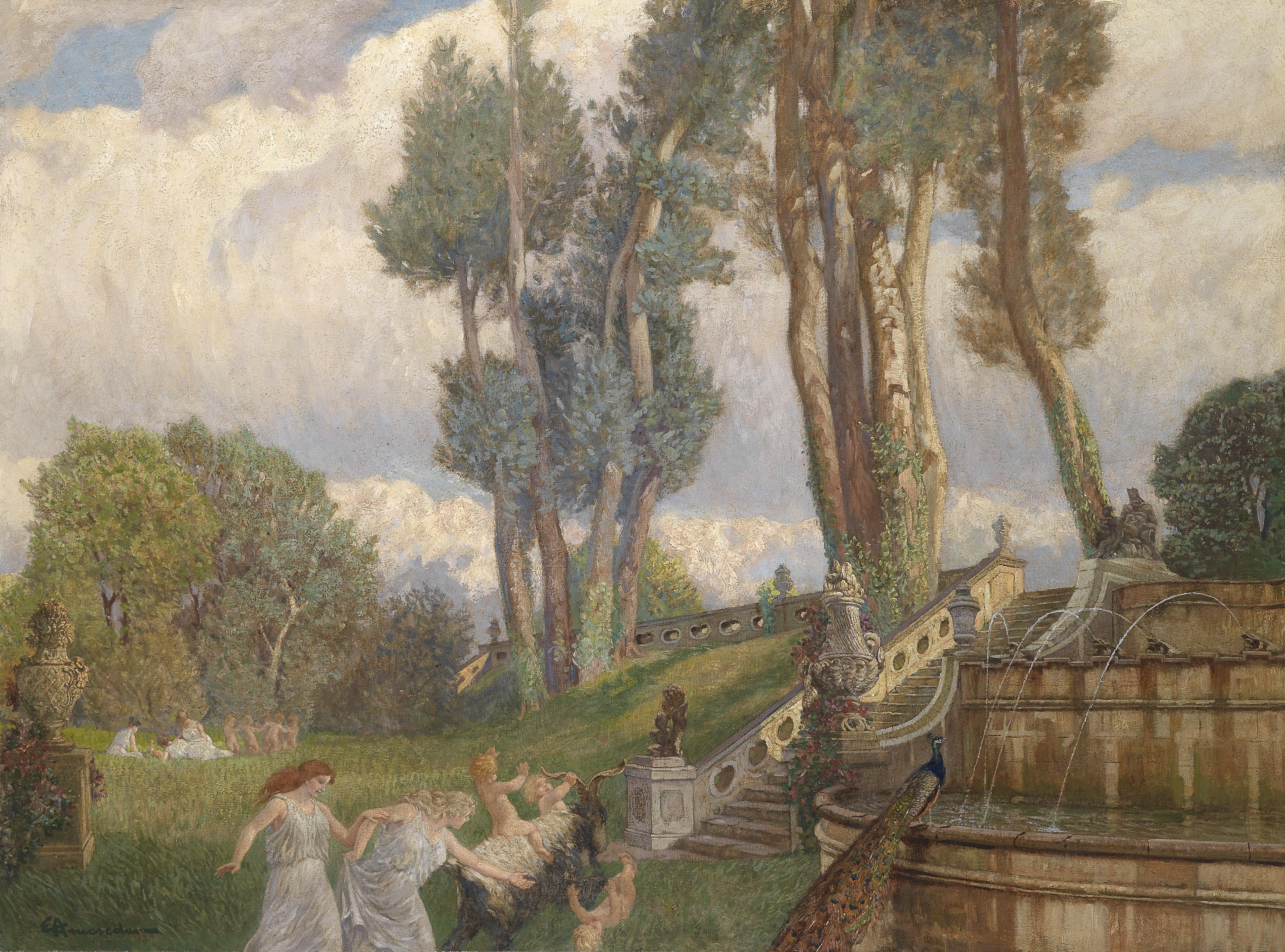 "Spielende Kinder", laut rückseitigem Klebezettel, signiert E. Ameseder (erste Signatur wurde überschrieben), Öl auf Leinwand, 108 x 146 cm